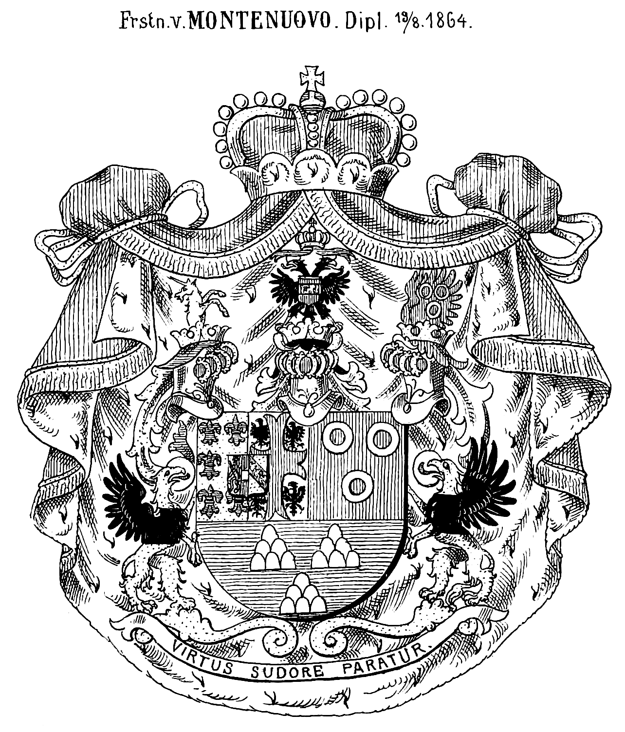 Wappen der Fürsten von Montenuovo